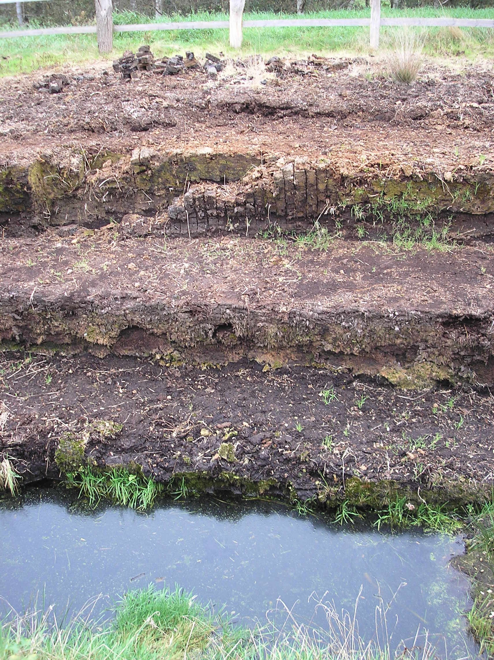 Schichtung eines Hochmoores (von oben nach unten: zersetzte Moos- und Pflanzenreste, Weißtorf, Schwarztorf – Moorerlebnispfad, NSG Huvenhoopsmoor